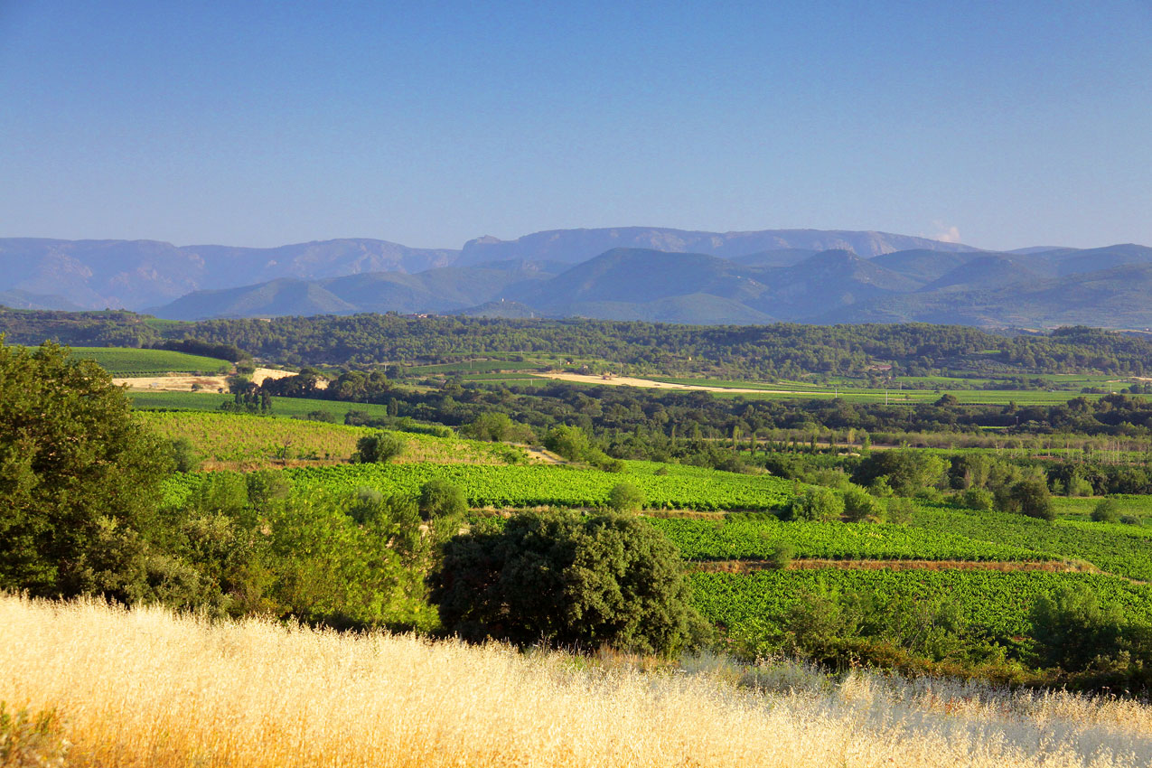 Vignes de la ville de Cazouls Les Bèziers